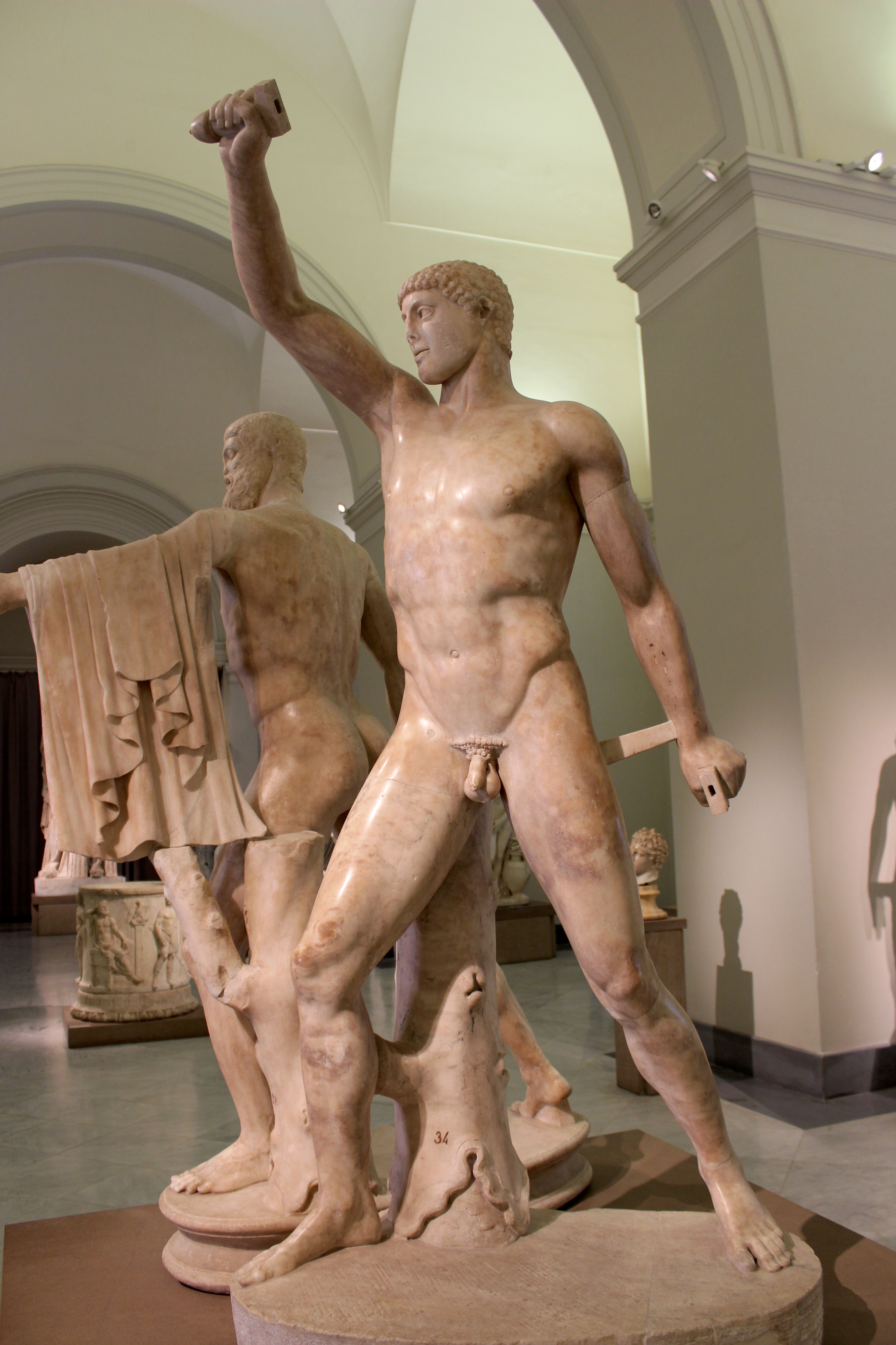 Nápoles. Museo Archeologico Nazionale. Harmodio y Aristogeiton.